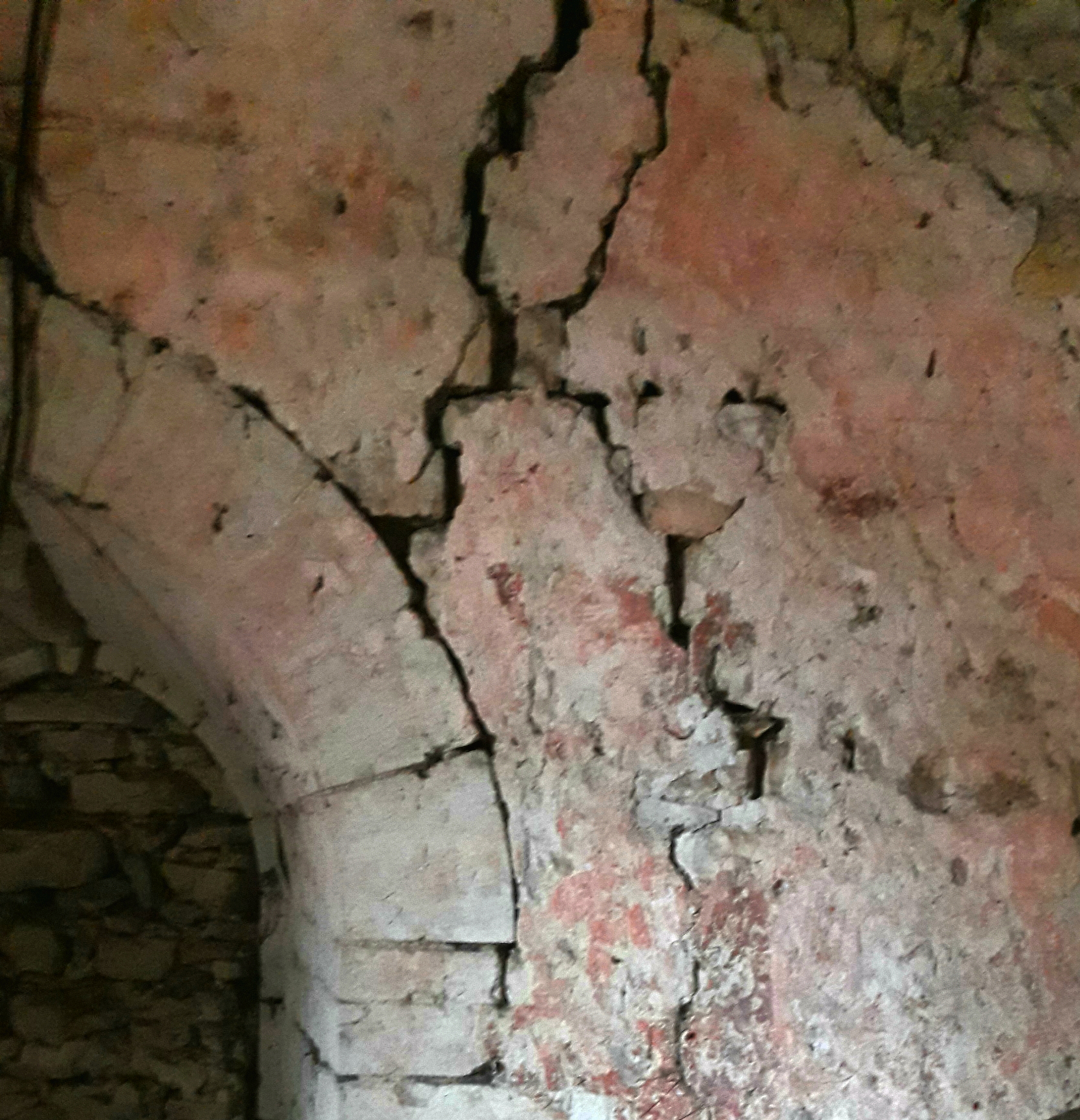 Une partie du chœur